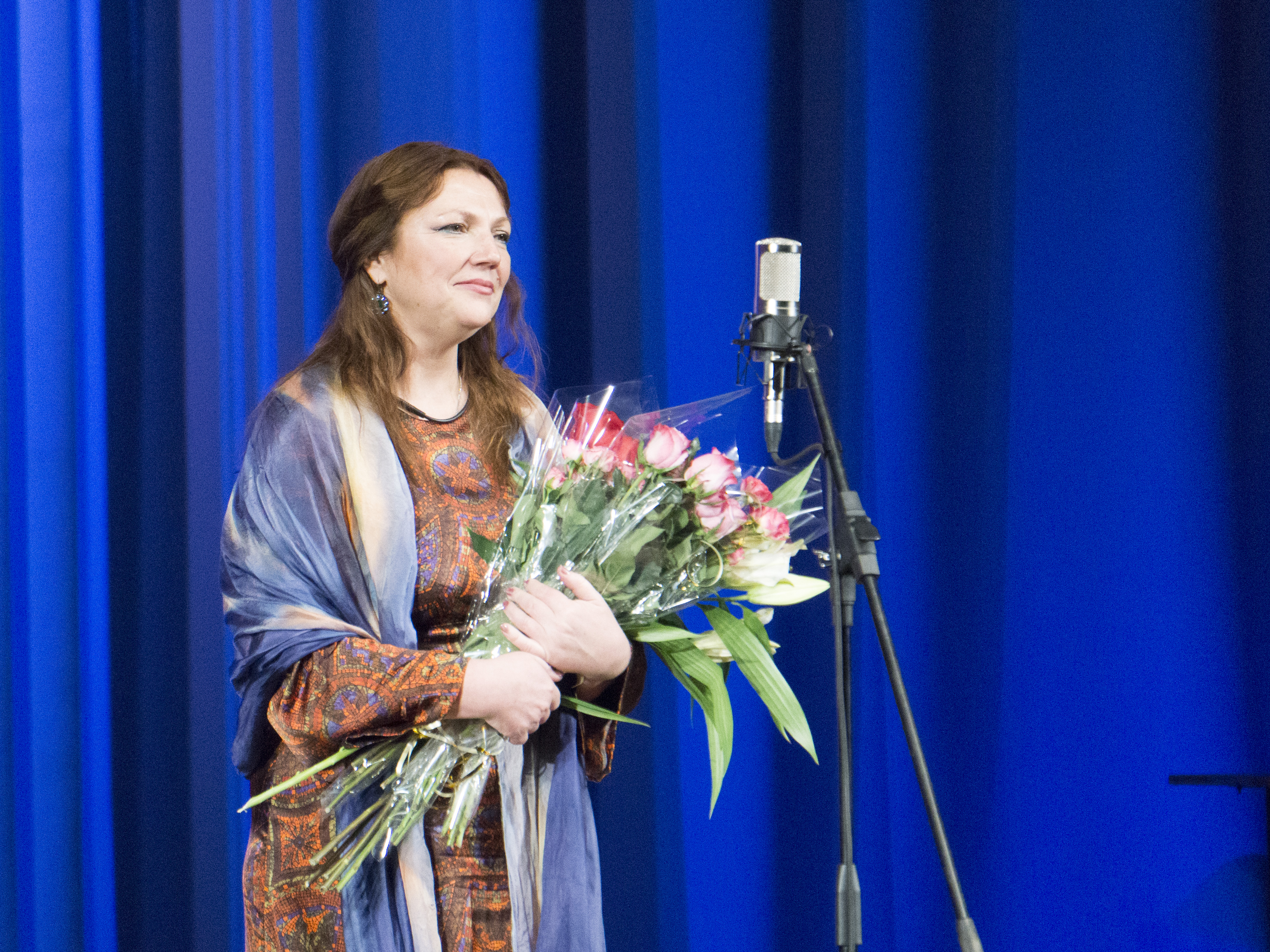 Евгения Смольянинова на концерте 7 ноября 2015 года в филармонии Тольятти